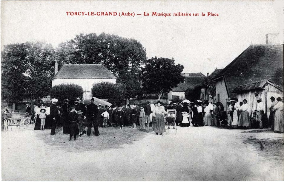 à Torcy-le-Grand, la marie et la place